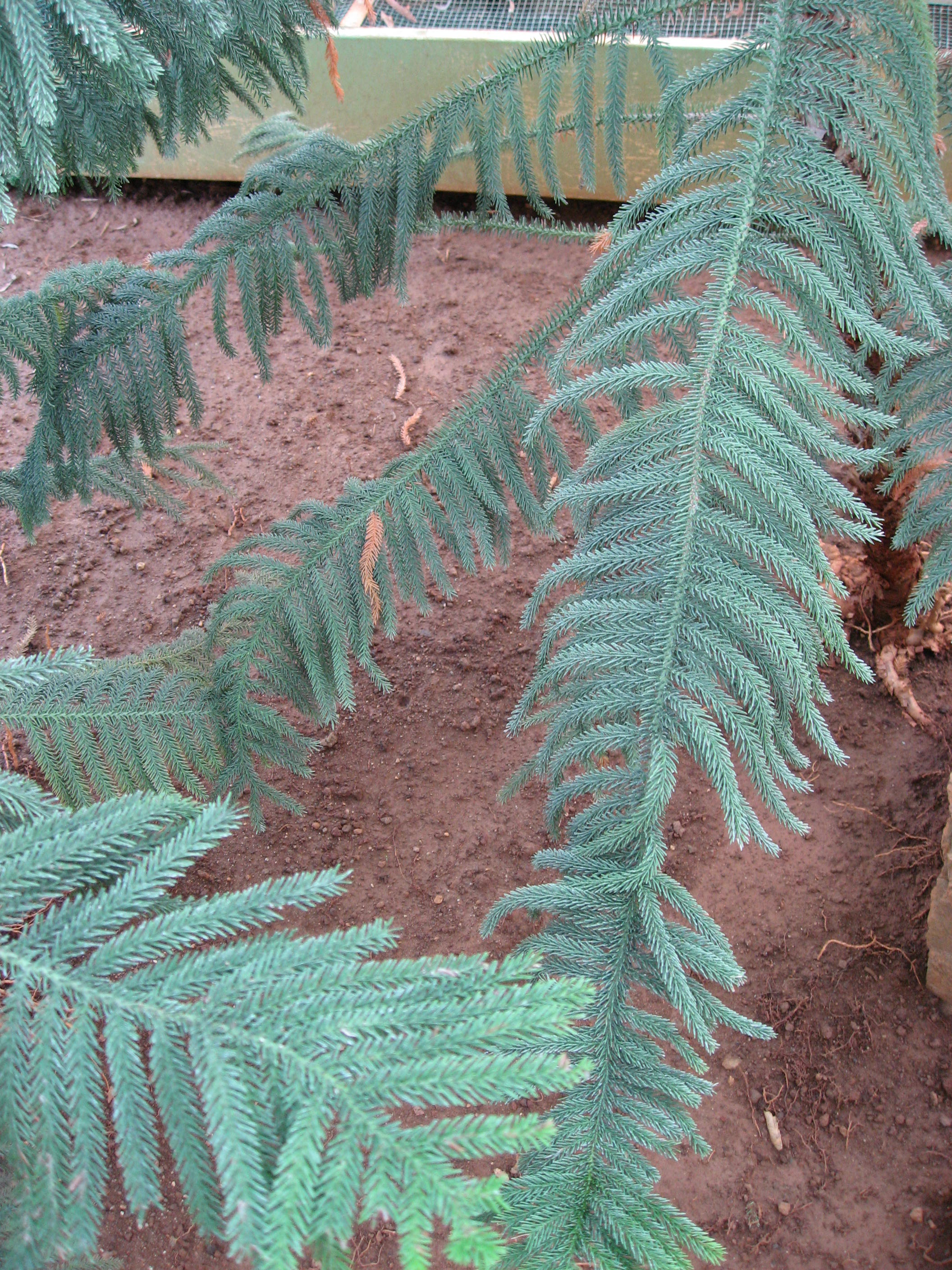 Araucaria luxurians in Serres d'Auteuil Map: 48° 50' 49" N 2° 15' 8" E